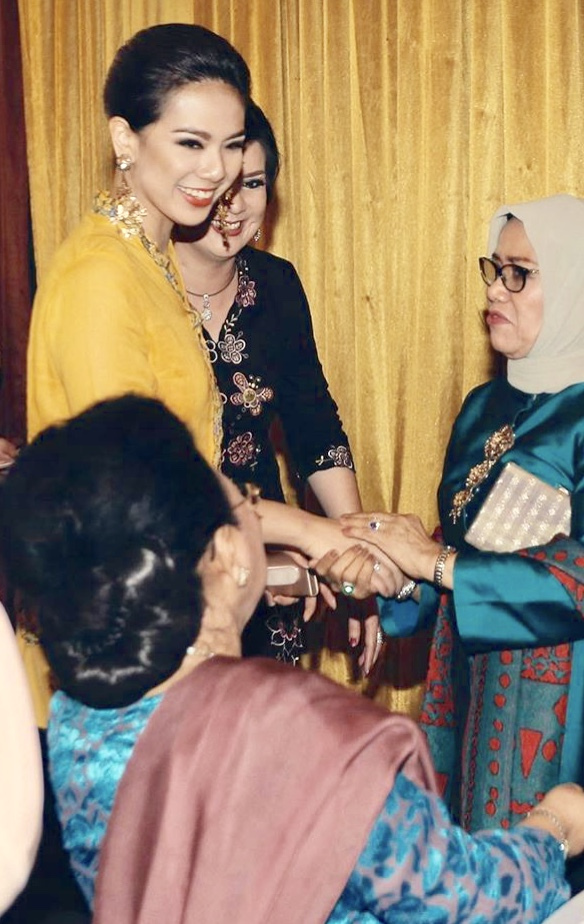 Devina Hermawan Mufidah Jusuf Kalla Ghea Panggabean